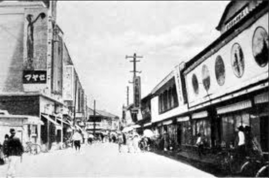 1940年前後の京城府、浪花館(右)とセヤマ楽器店(左)